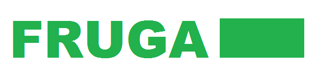 LOGO FRUGA